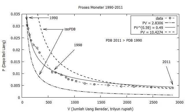 Data-data moneter indeks daya beli (P) dan jumlah uang beredar (V) diplot dalam diagram PV sehingga didapatkan persamaan umum proses moneter di Indonesia.